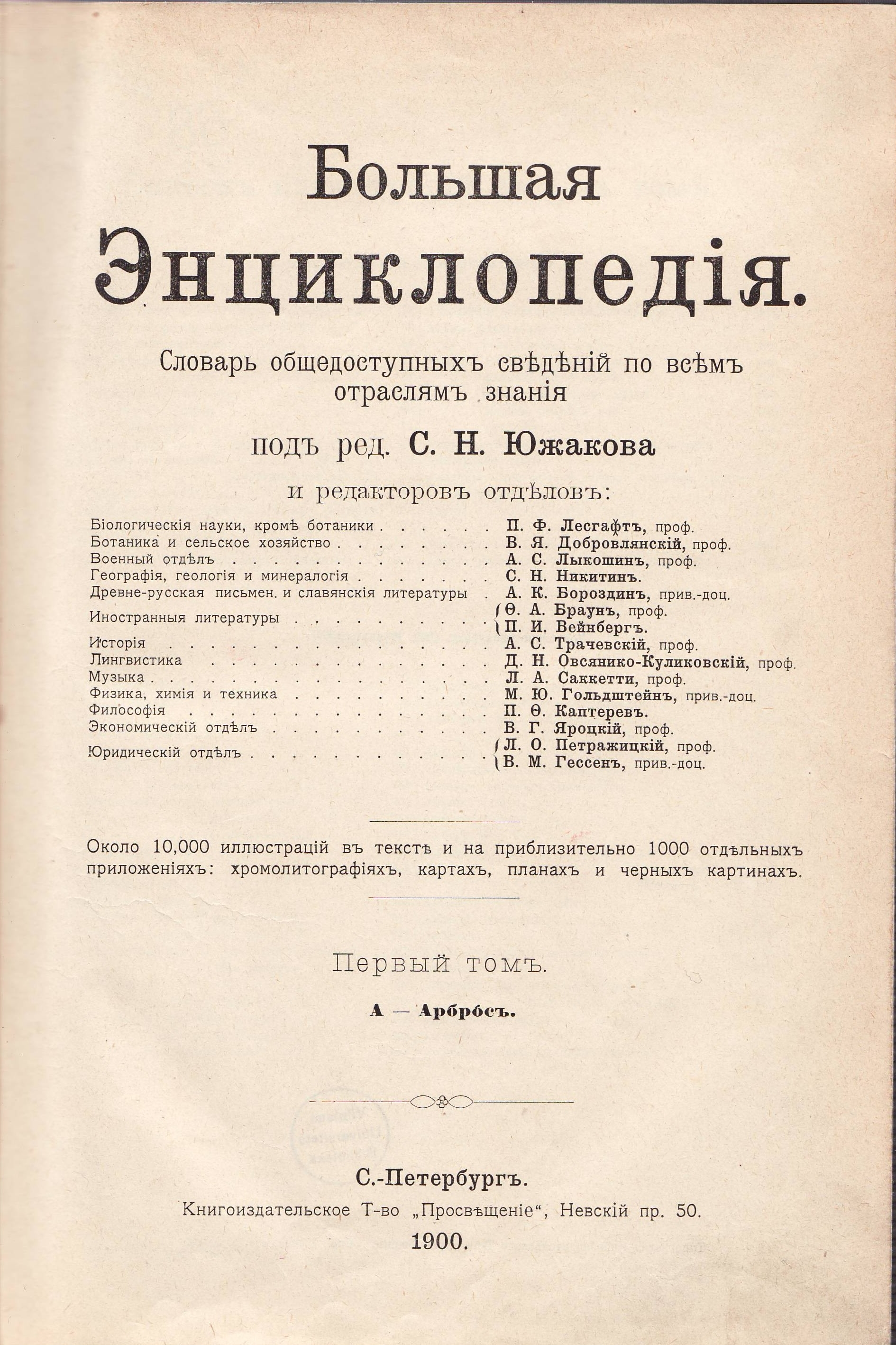 Большая энциклопедия. Словарь общедоступных сведений по всем отраслям знаний под ред. С. Н. Южакова. Первый том. А - Арбросъ. С.-Петербург. Книгоиздательское Т-во "Просвещение", 1900. Титульная страницаTitle pages of Great Encyclopedia. 1900